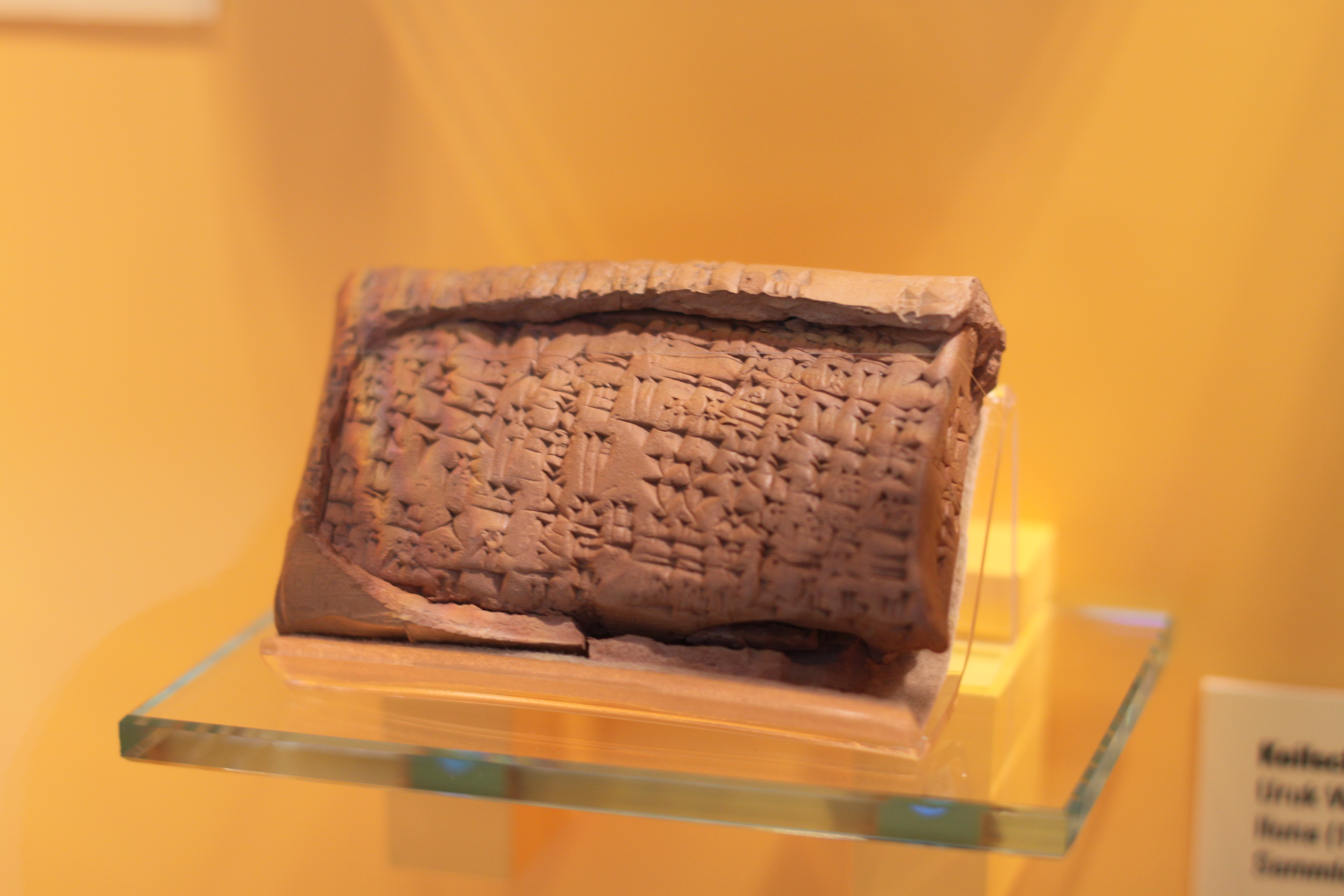 Keilschrifttafel; Uruk Warka; irak; vermutlich unter König Samsu Iluna (1749-1712 v. Chr.) Sammlung Kohn 1914; eine altbabylonische Urkunde - der Vertrg über den Verkauf eines Baugrundstücks; im Überseemuseum